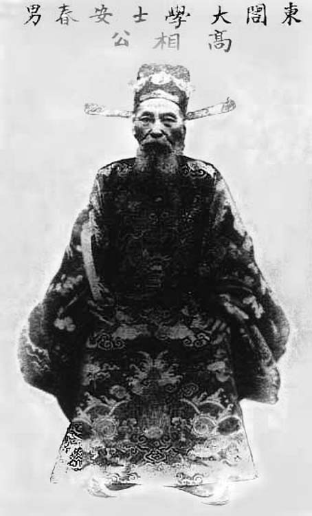 quan Thượng thư Bộ học Cao Xuân Dục